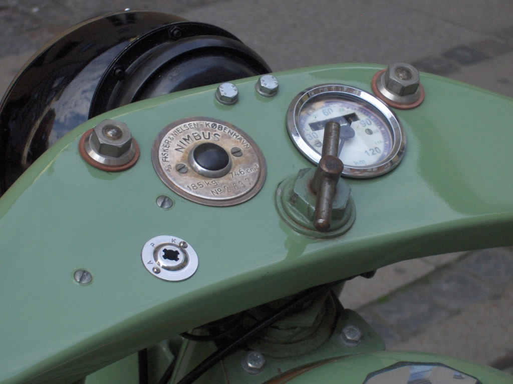 Nimbus dashboard